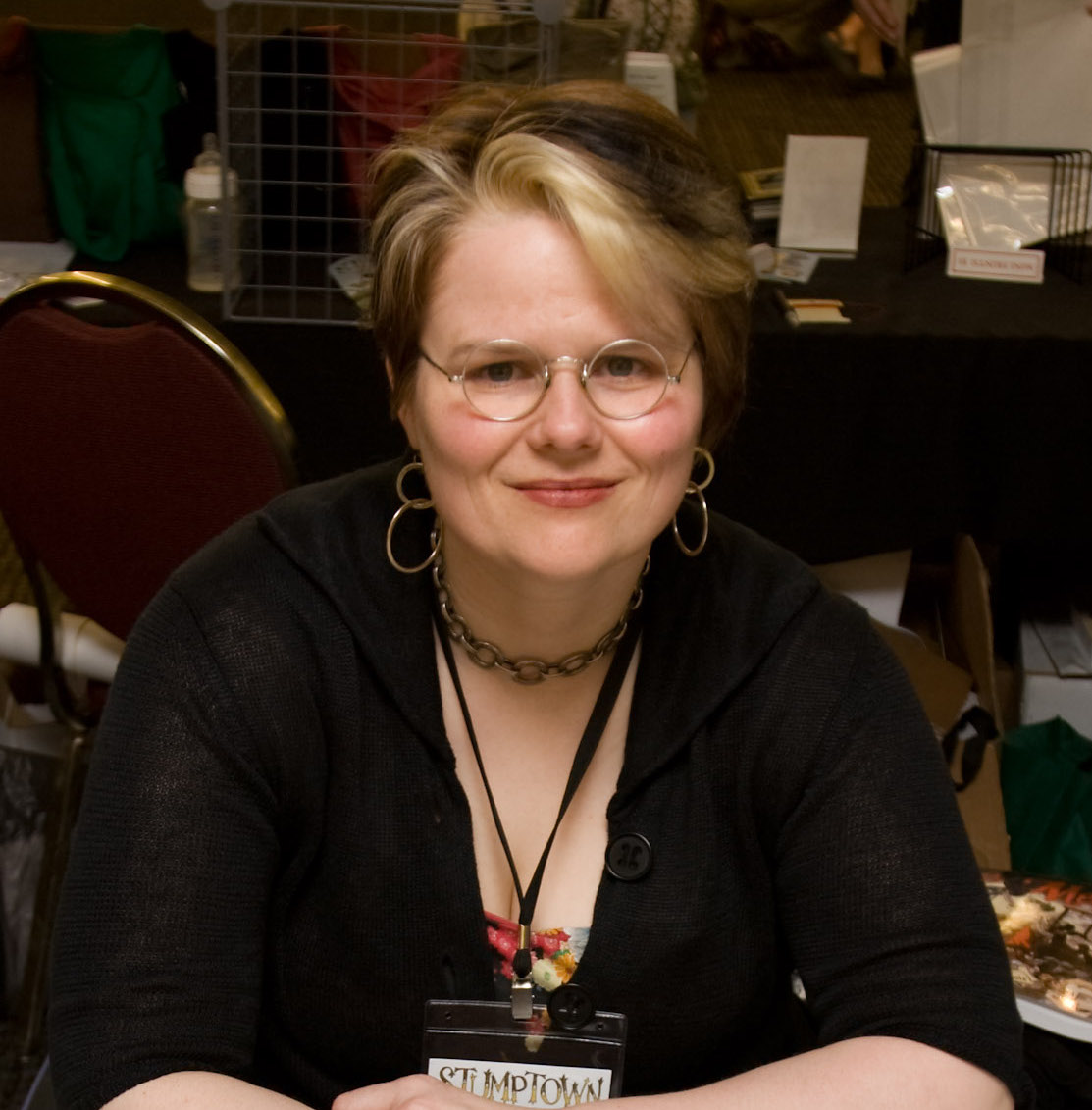 Sara Ryan